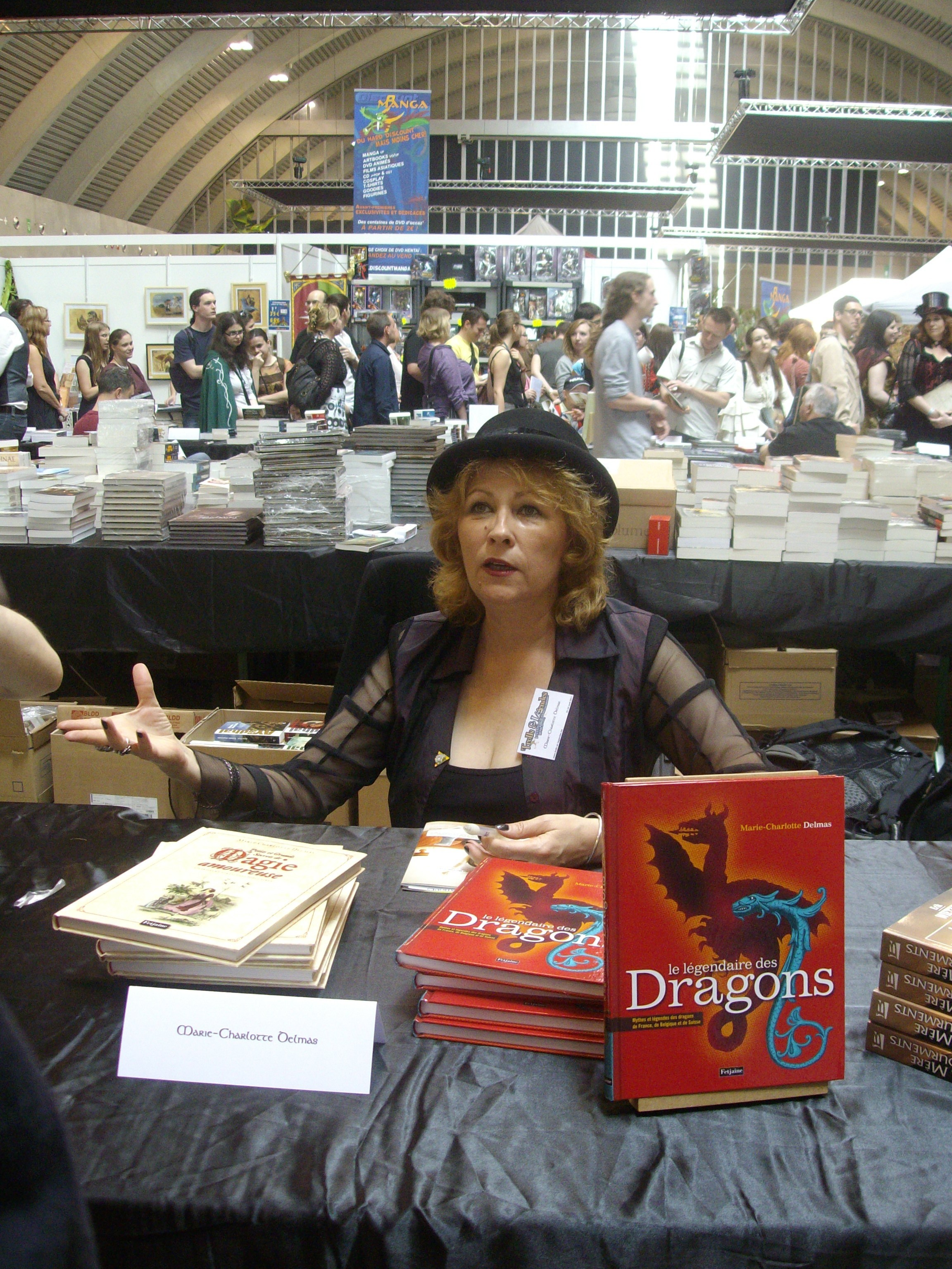 Marie-Charlotte Delmas au festival Trolls et légendes de Mons